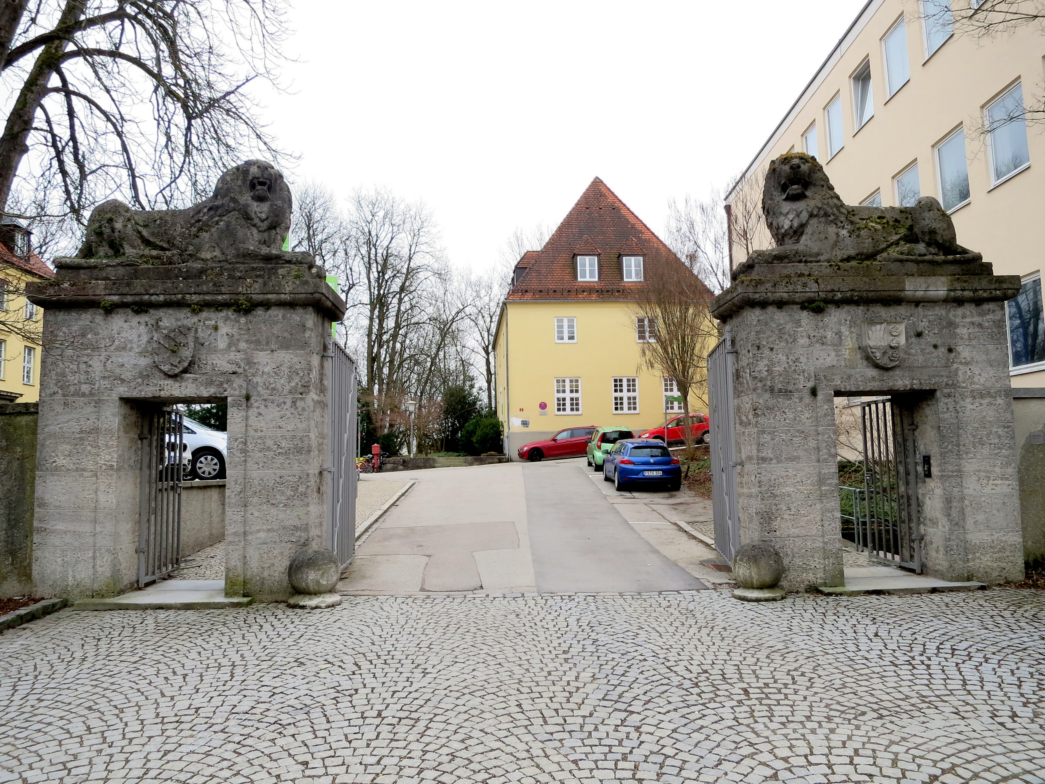 Tor zu dem ältesten Bereich der HSWT